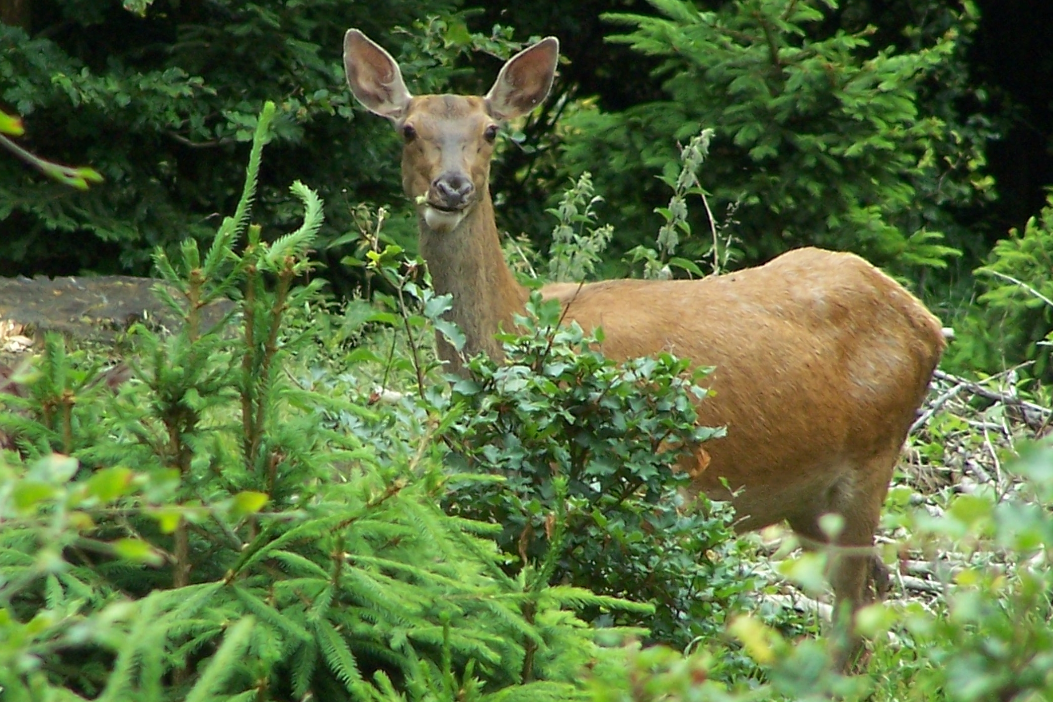 Hirschkuh beim Äsen am Südhang des Inselsberges.